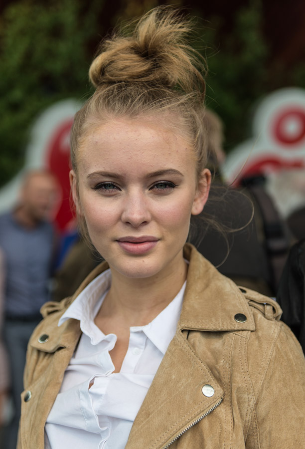 Zara Larsson var en av artisterna inför Allsång på Skansen som presenteras den 10 juni 2015 på Skansen i Stockholm.